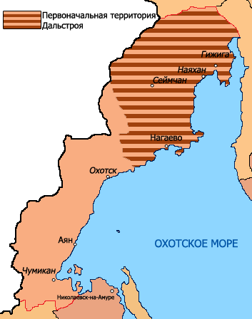 Карта территории Охотско-Эвенского НО и первоначальная территория Дальстроя (на основании схемы)